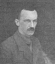 Josef Kudela, český legionářský spisovatel a pedagog